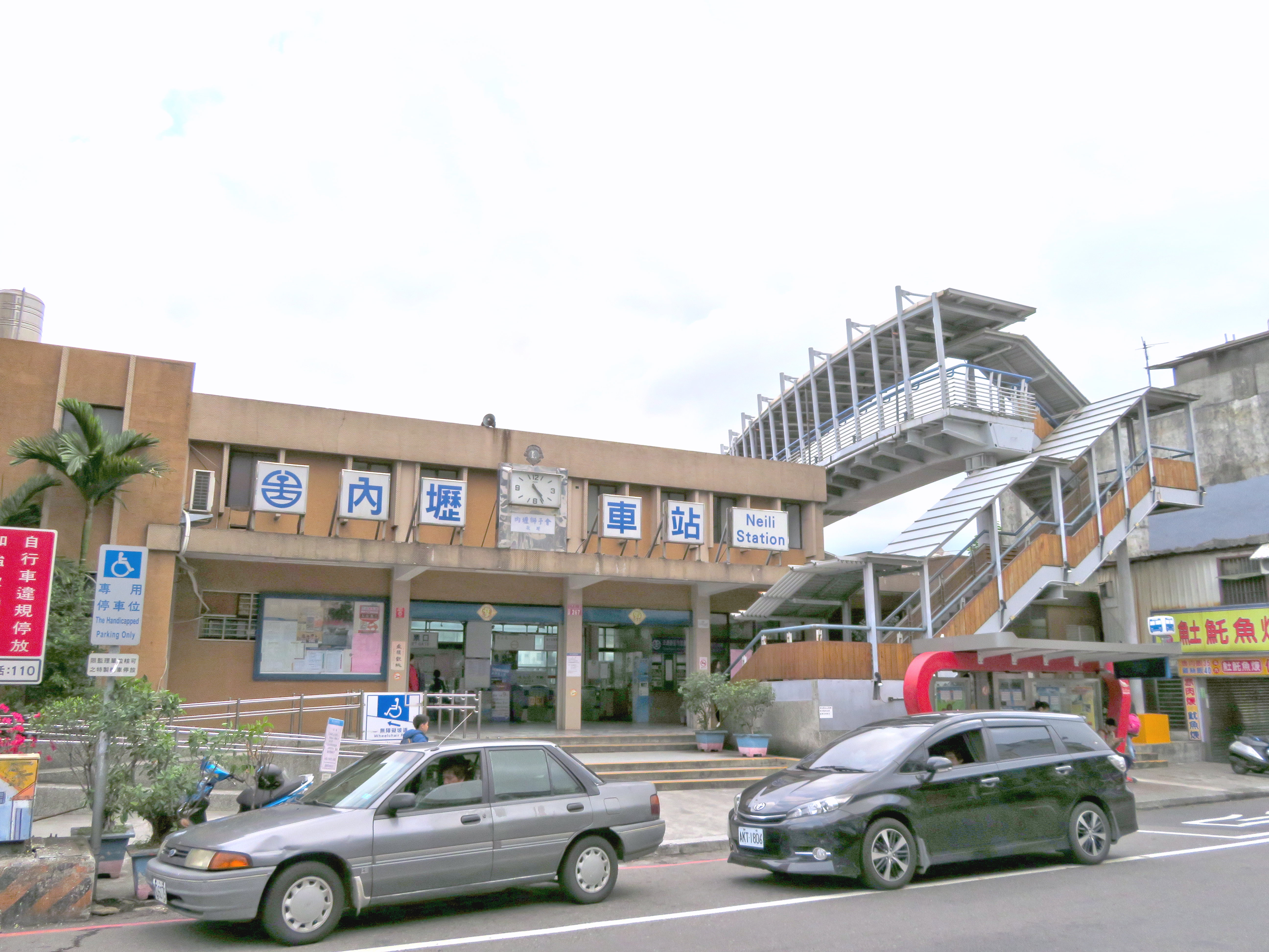 2017/01/16 內壢車站前站景象